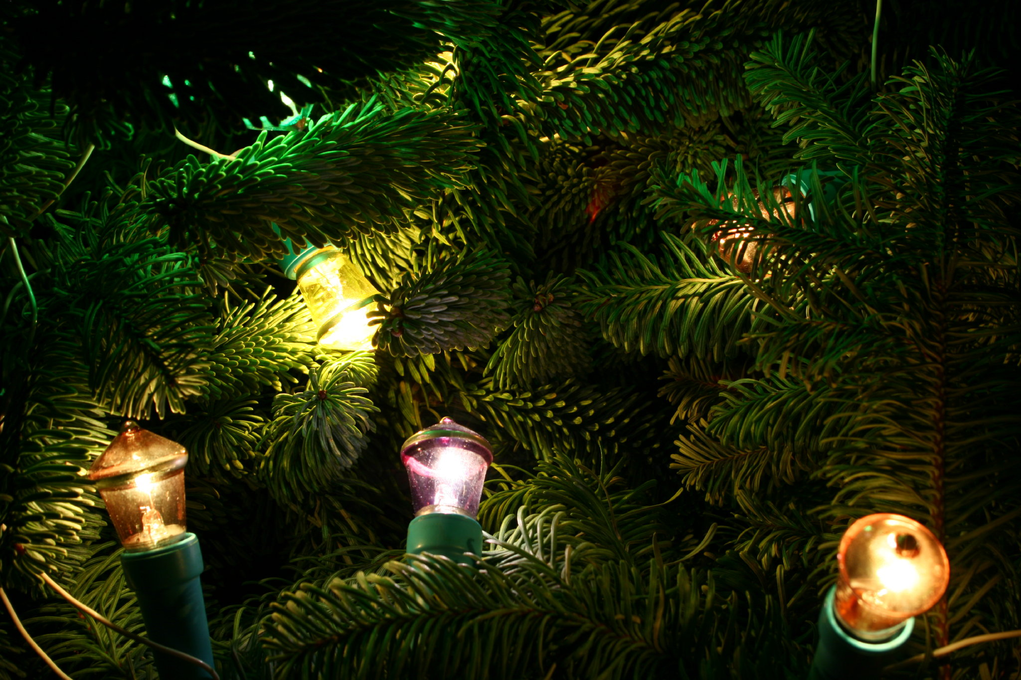 Елочная электрогирлянда "Московский фонарик". МЭЛЗ, СССР, 1970г.